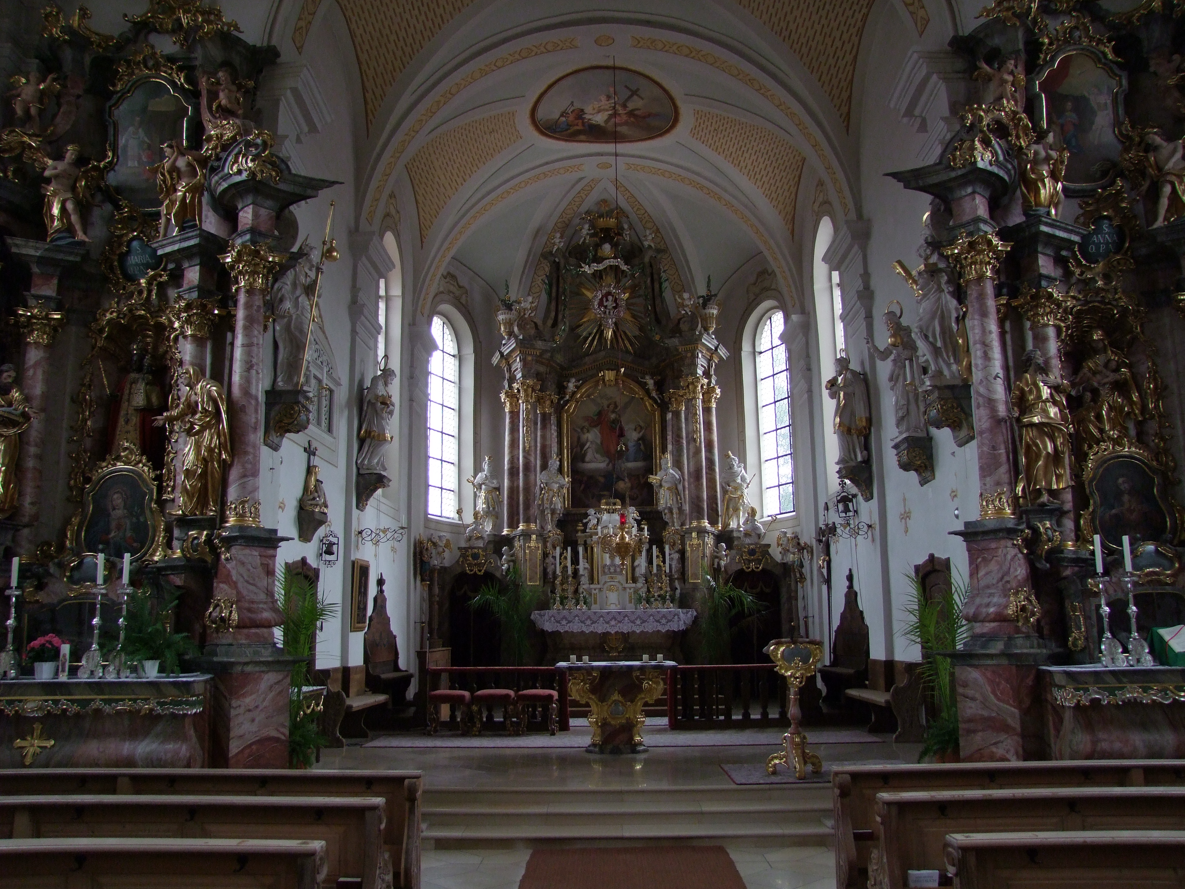 St. Michael in Stockheim in Schwaben